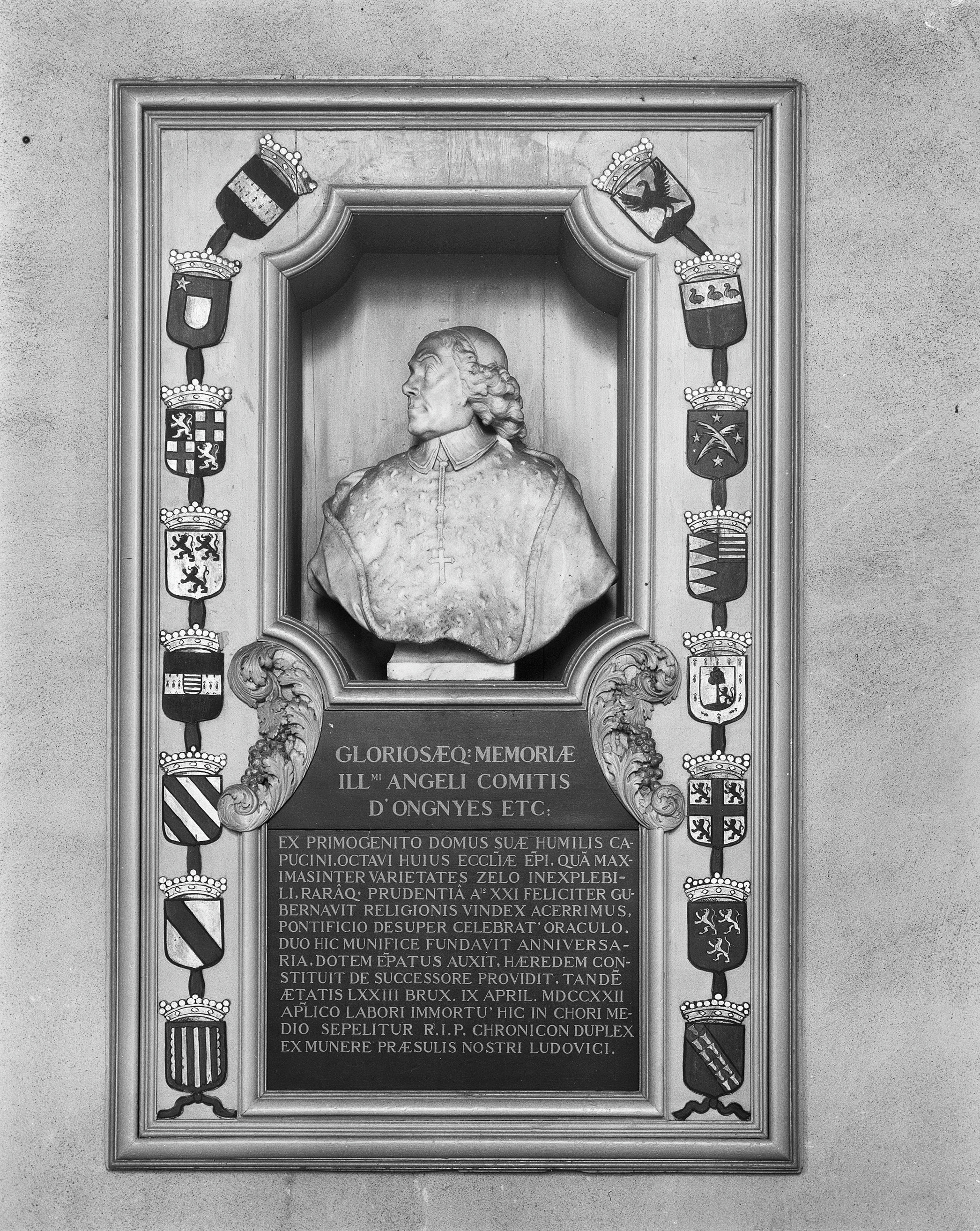 Kathedraal, Rooms-Katholieke Kerk Van De Heilige Christoffel: grafsteen